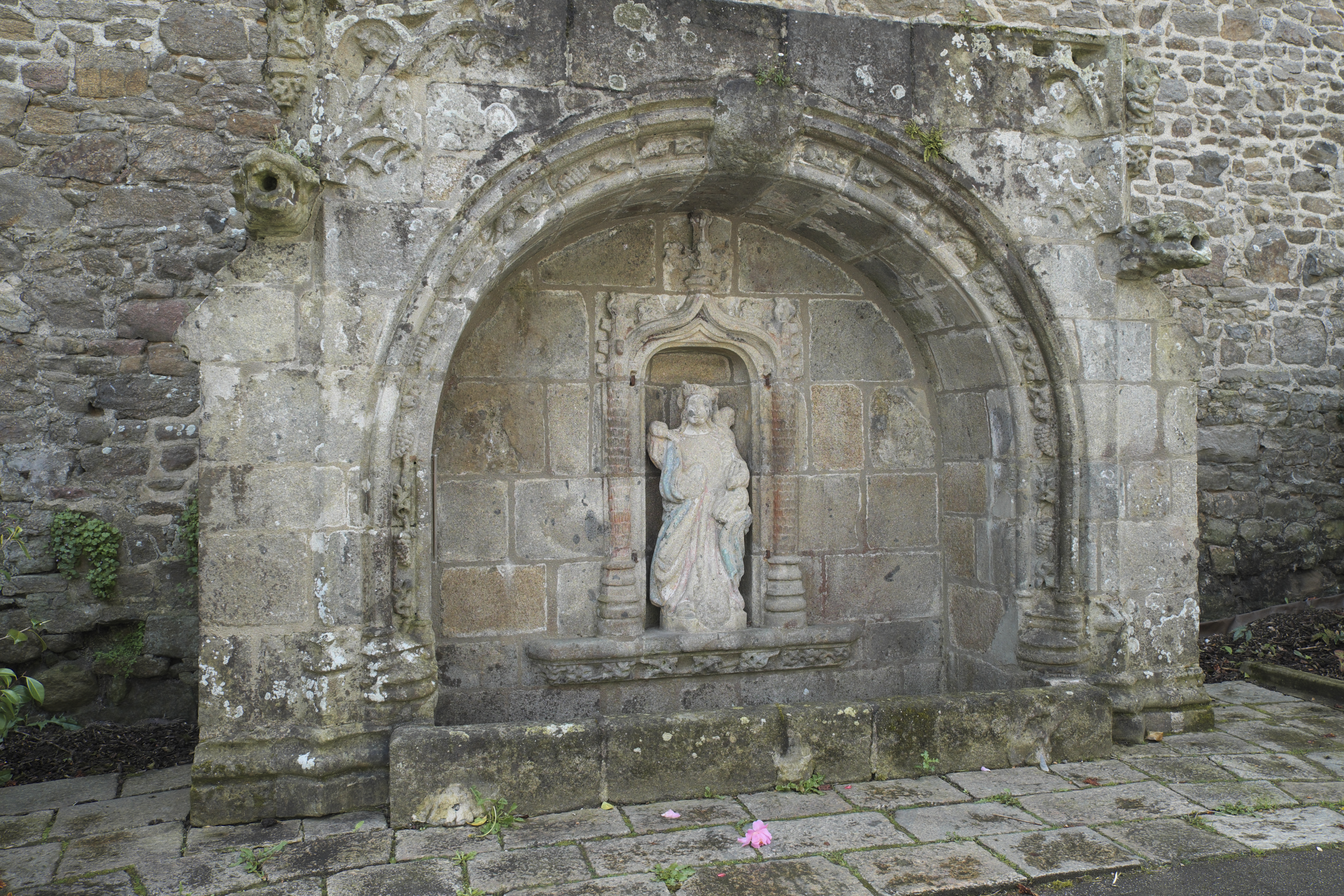 Brunnen, Fontaine de Notre-Dame de la Porte, in Quintin im Département Côtes-d’Armor (Region Bretagne/Frankreich)